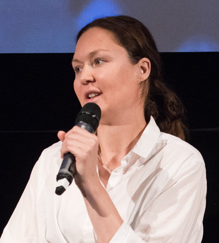 Linda-Maria Birbeck under presentationen av filmen "Det borde finnas regler" i Filmhuset i Stockholm 2015.